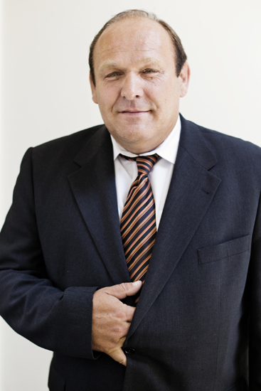 Mgr. Stanislav Huml, poslanec.